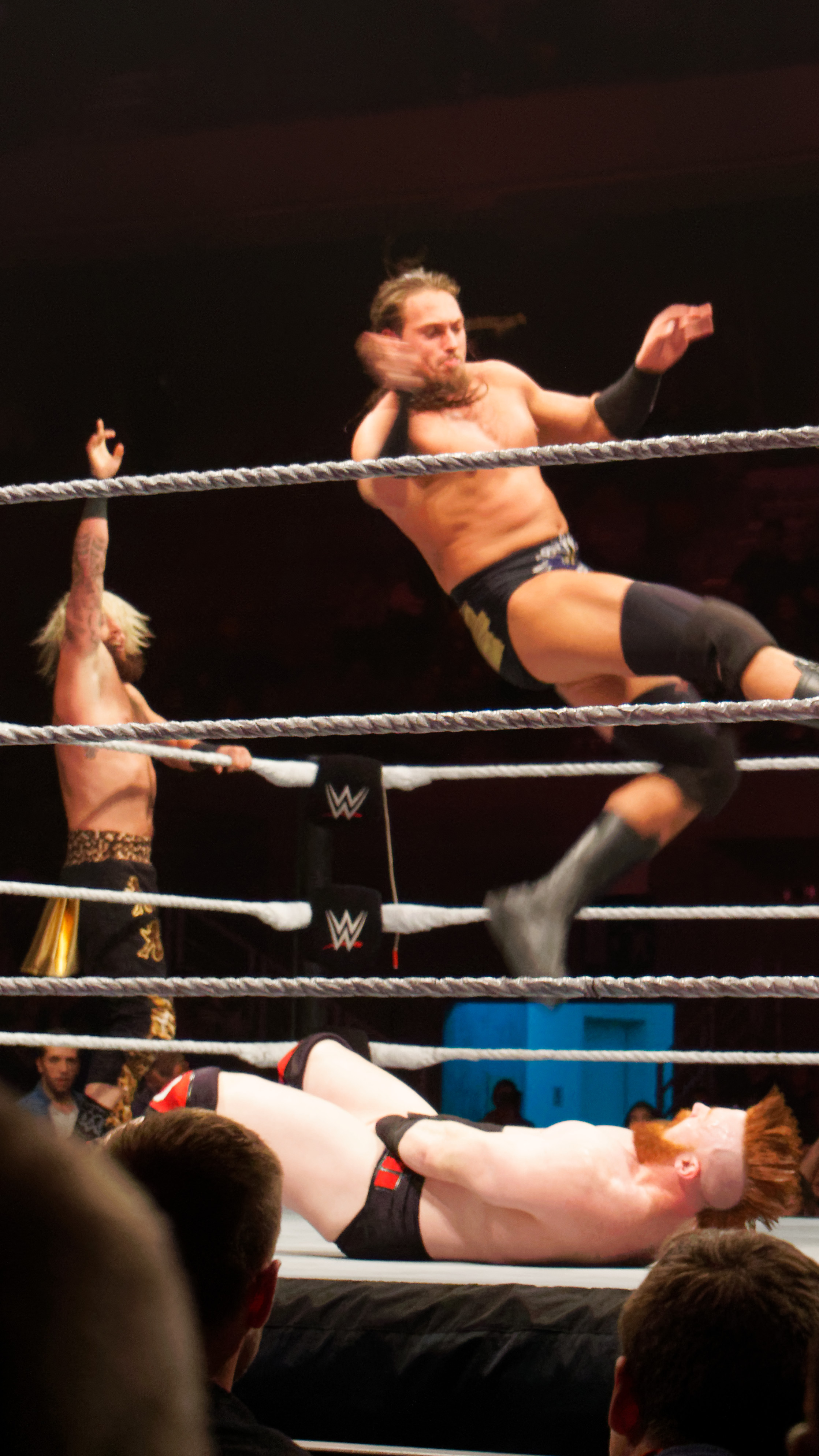 Jeff Hardy (c) & Matt Hardy (c) defeat Big Cass & Enzo Amore, Cesaro & Sheamus (in Triple Threat Match) Info on the match : WWE RAW Tag Team Title ( Le vendredi 12 mai, la WWE Live Tour fera escale au Country Hall a Liege pour le spectacle de catch de l'annee! Au programme: des duels impitoyables et des rencontres captivantes entre les meilleures equipes et les plus grands rivaux. )